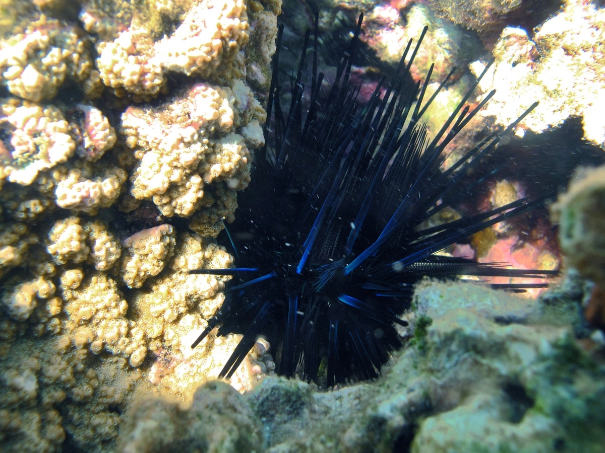 Un oursin Echinothrix diadema à la Réunion.